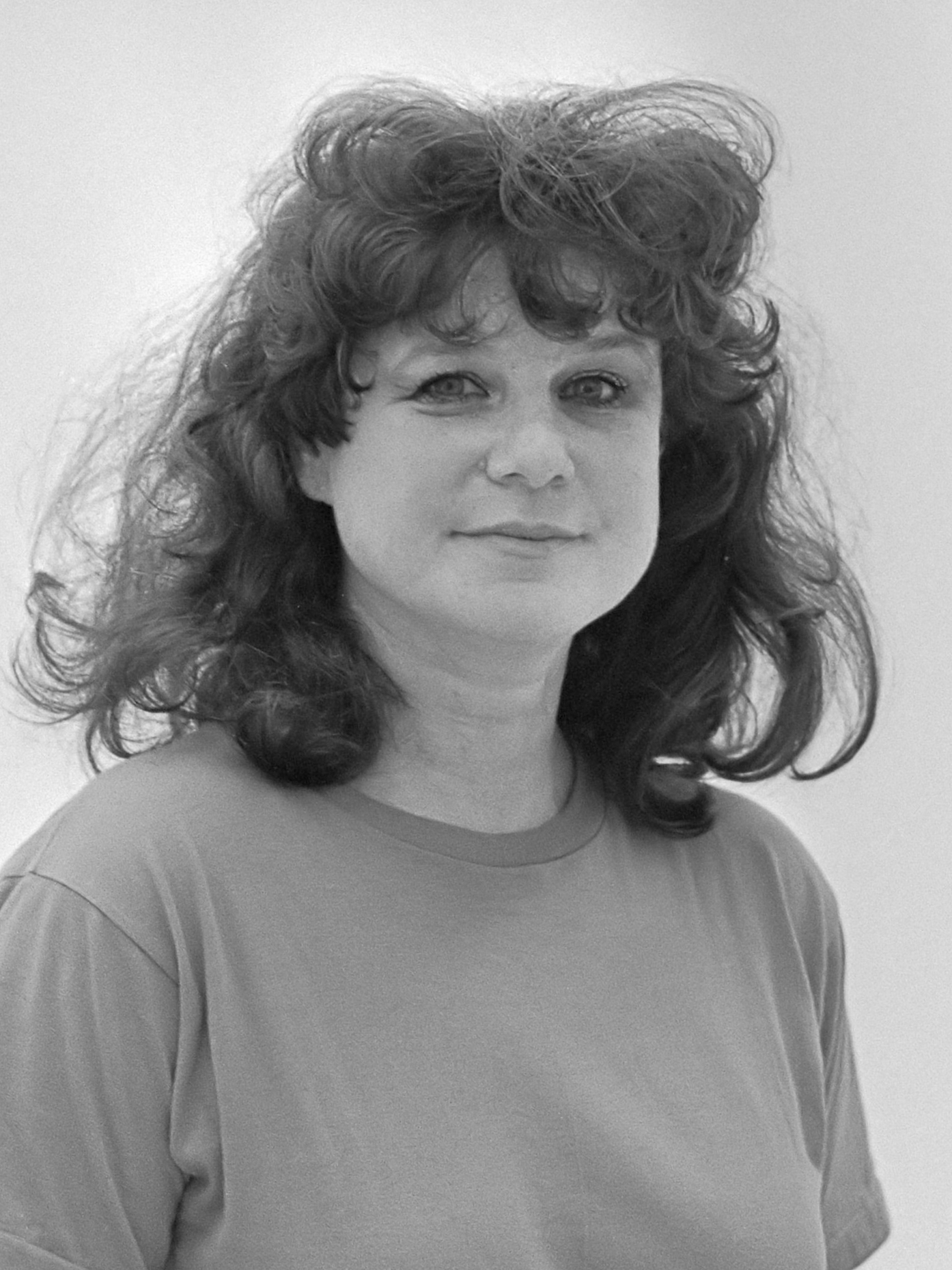 Opdracht Tubantia, Jacqueline de Jong, schilderes 21 juli 1982